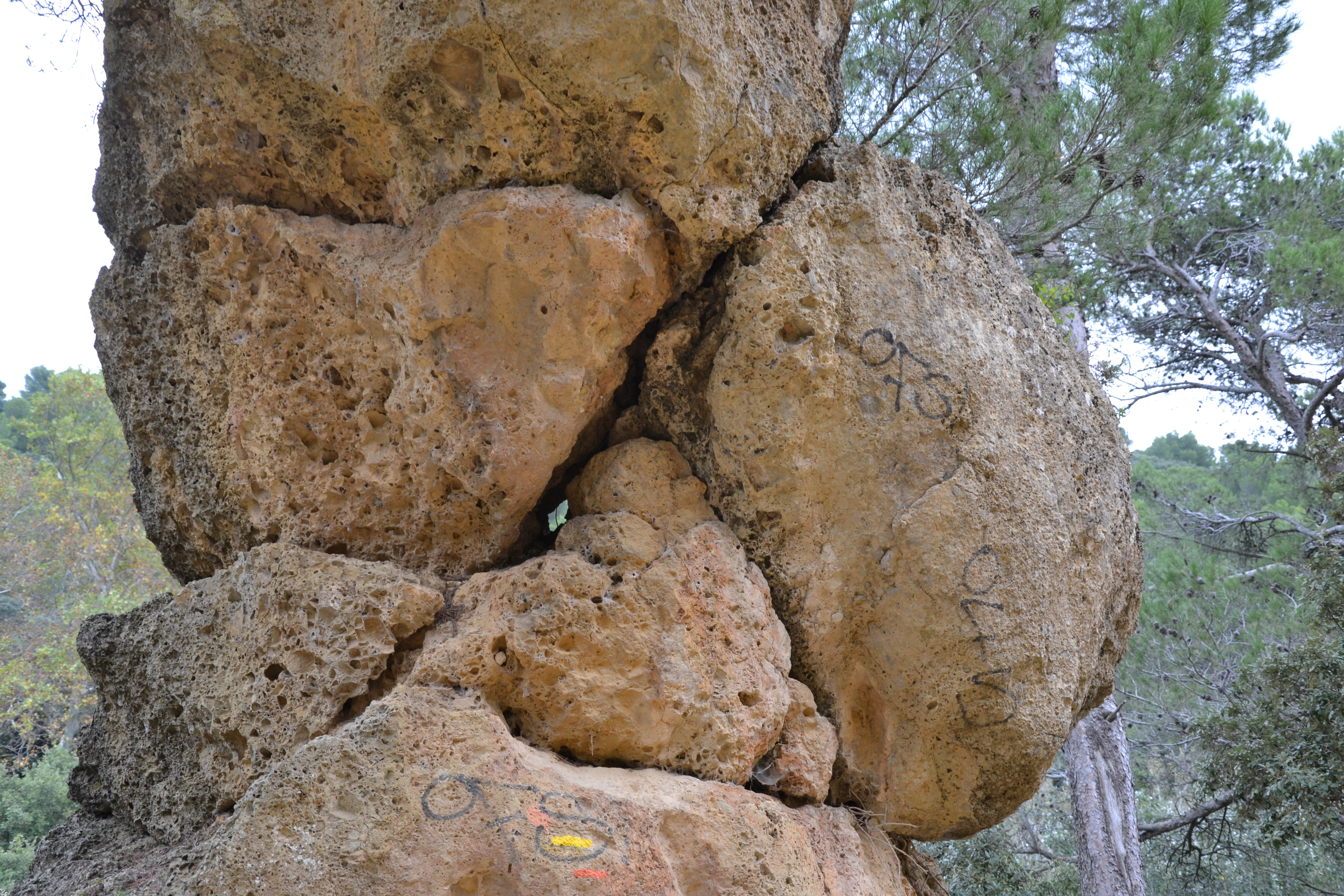 Menhir de Vacqueyras, formation géologique des dentelles de Montmirail